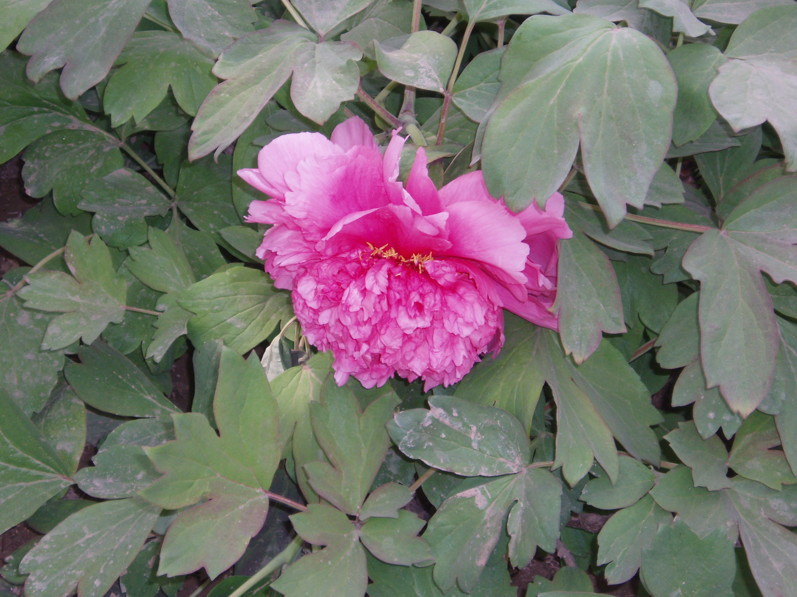 Peony